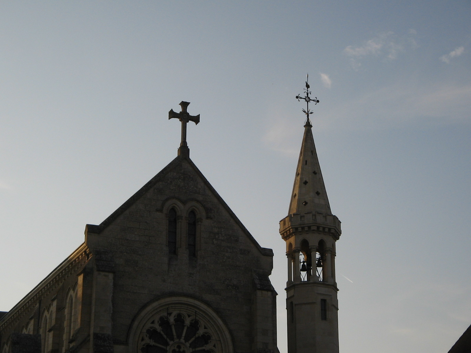 La Puye, Chapelle de la Maison-mère des filles de la Croix, en septembre 2011